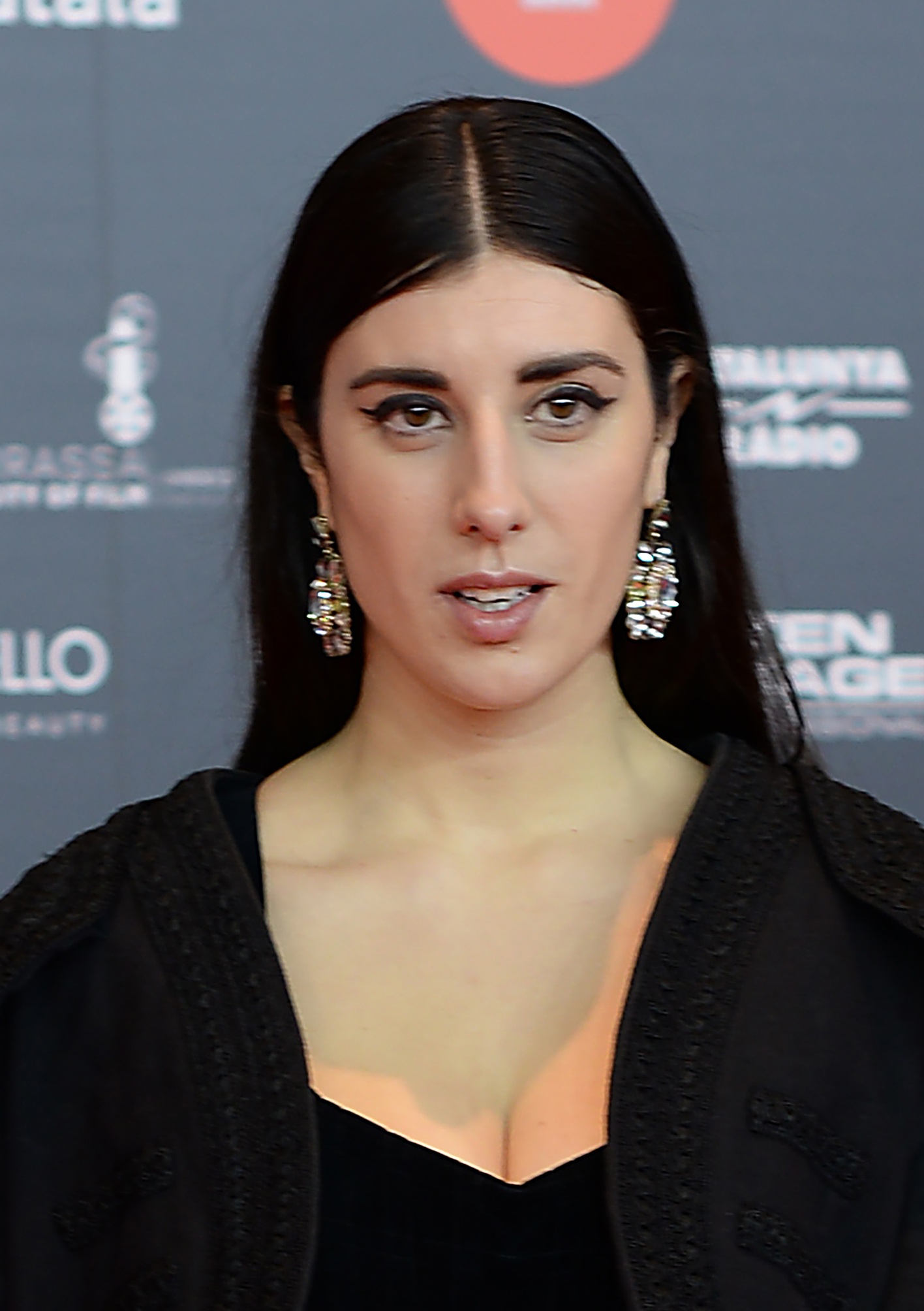 Elena Martín, actriu, XII Premis Gaudí (2020)